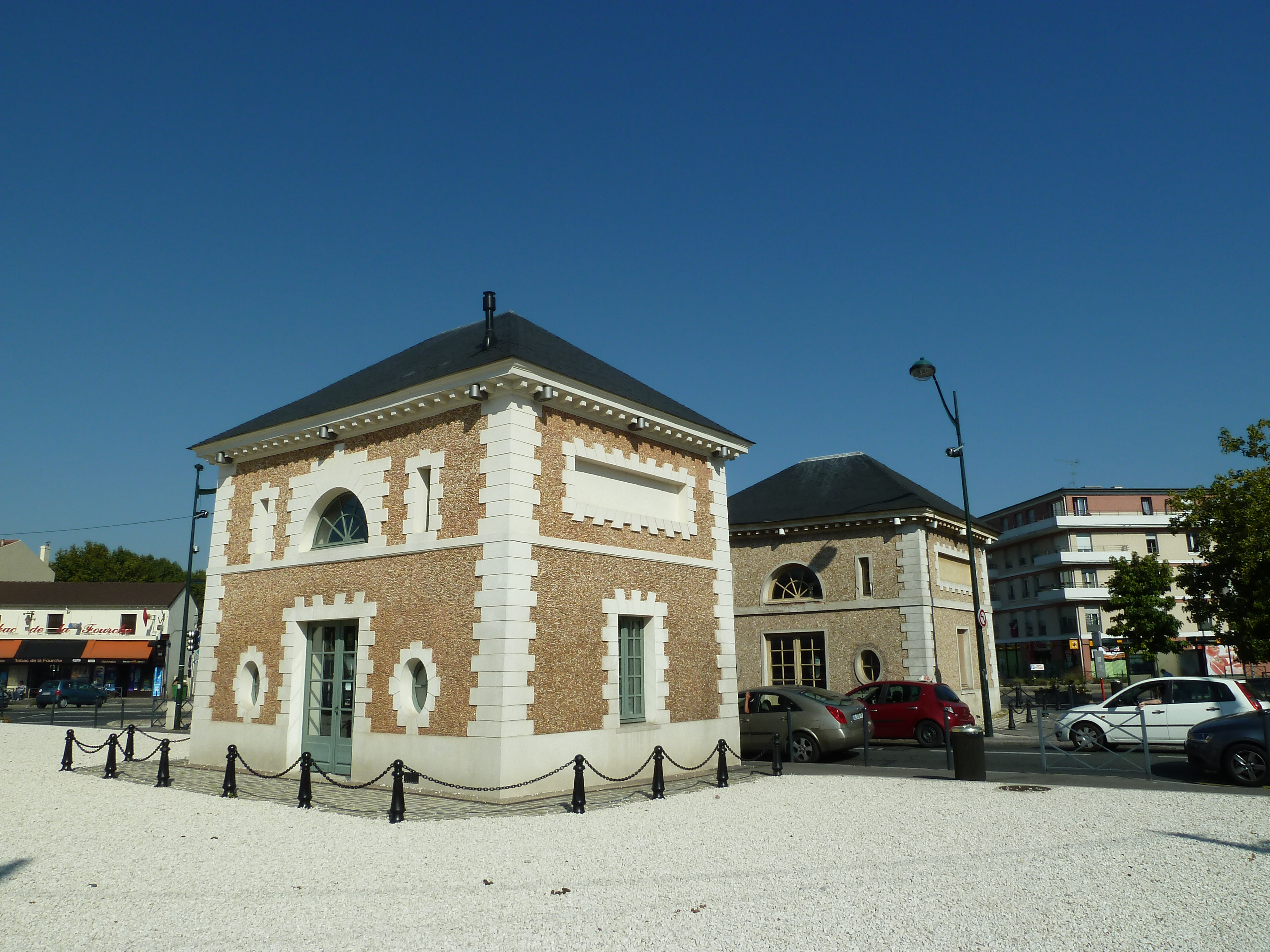 Parc à l'anglaise du duc d'Orléans - Les Pavillons-sous-Bois - Seine-Saint-Denis - France - Mérimée PA00079945 .